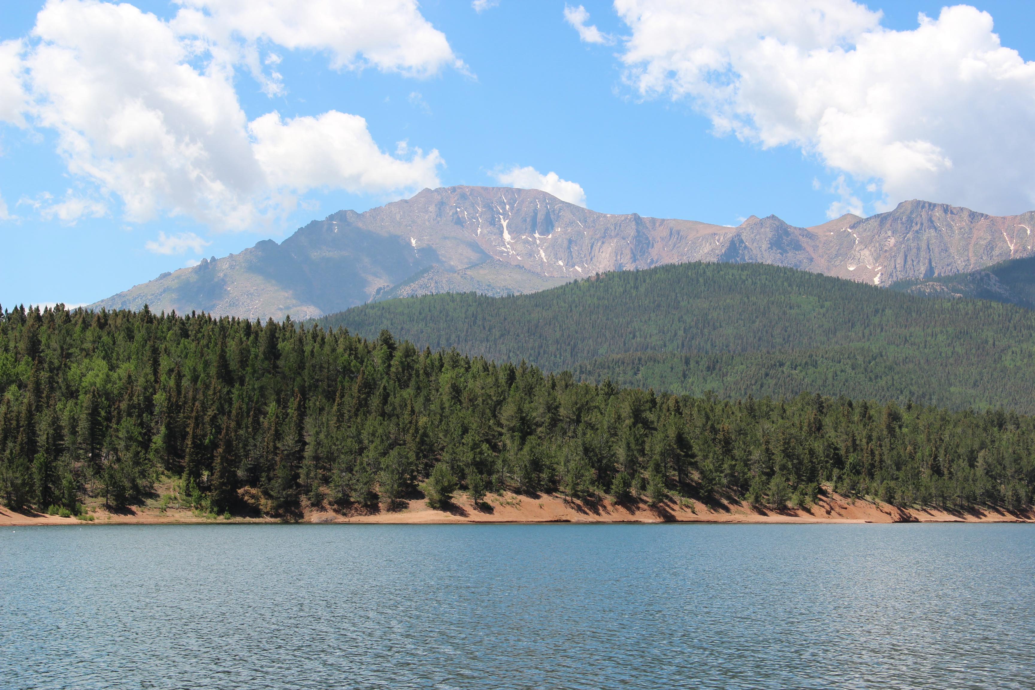 Pikes Peak